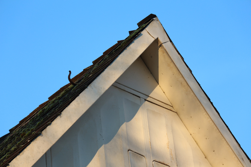 MAN-Stahlhaus Detailaufnahme des Dachkiebels